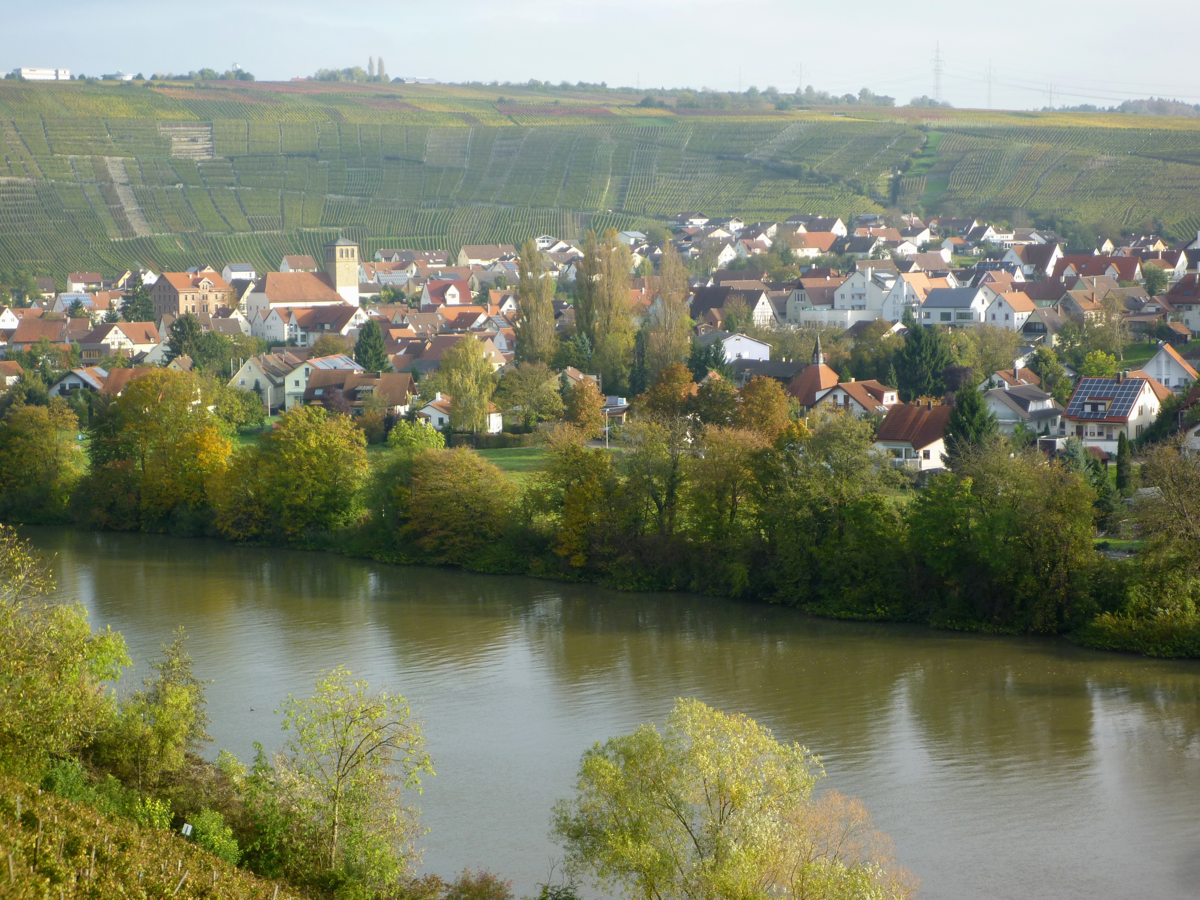 Mundelsheim am Neckar, Weinanbau